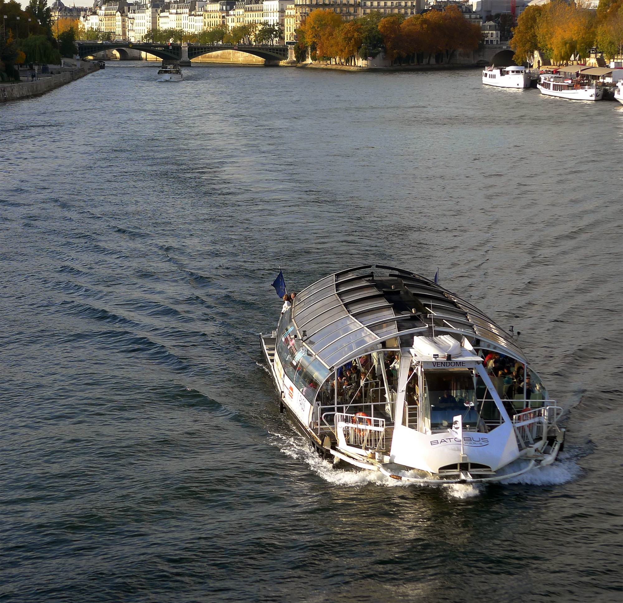 Batobus Vendôme sur la Seine entre les ponts d'Austerlitz et de Sully (en arrière-plan) - Paris V et XII